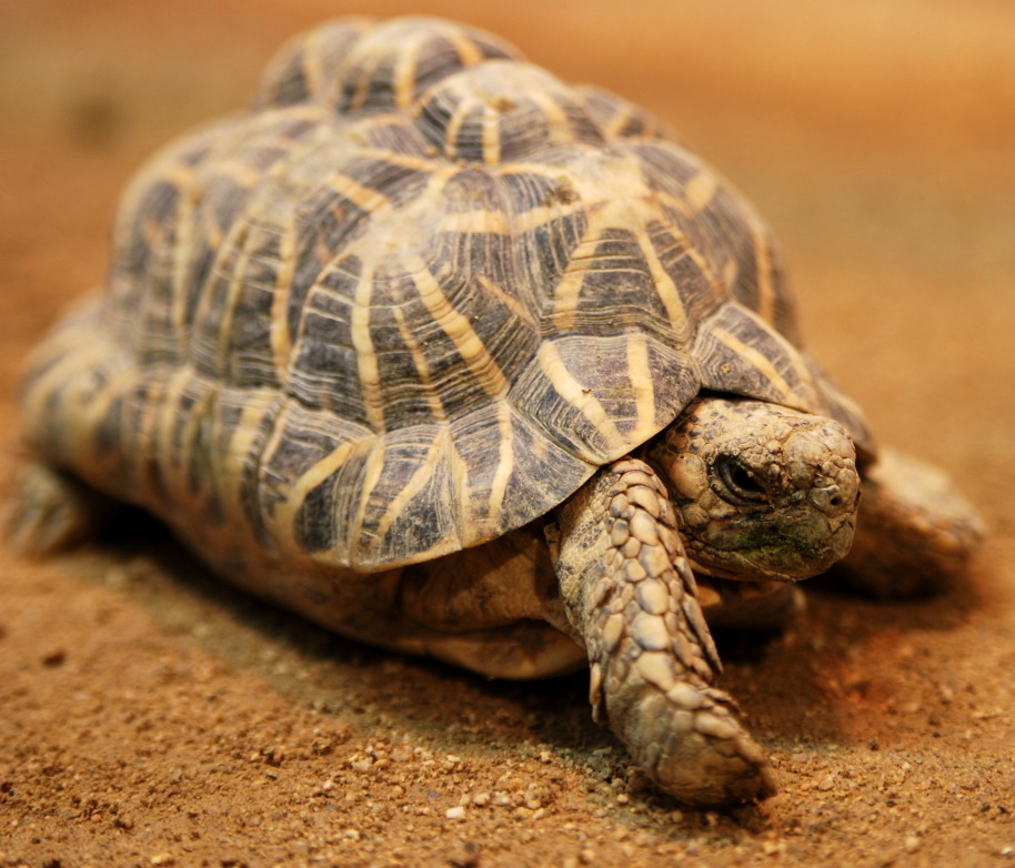 天王寺動物園のインドホシガメ